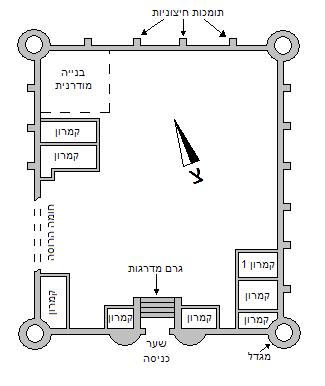 תרשים סכמטי של מבצר כפרלט הצלבני.תמונה שיצרתי בעצמי בעזרת תוכנת "צייר" של חלונות במרץ 2006.אסף.צ 19:29, 6 מרץ 2006 (UTC) Plan of the crusader fortress Cafarlet, HaBonim, Israel